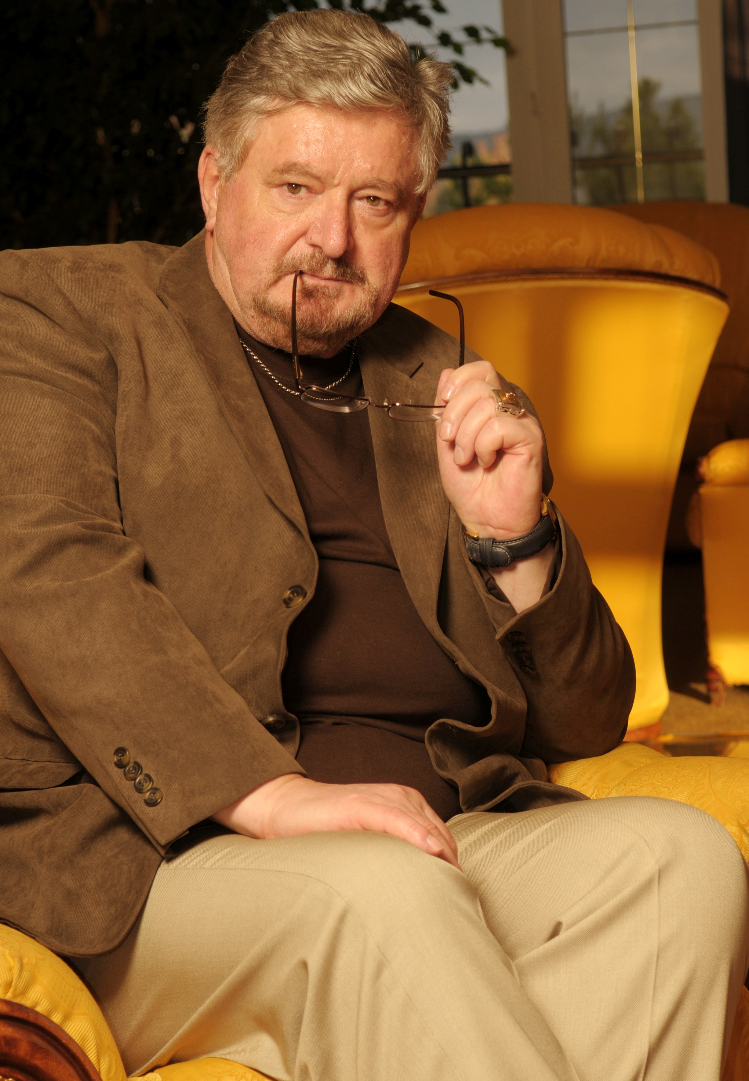 Prof. Milan Zelený, M.S., Ph.D.